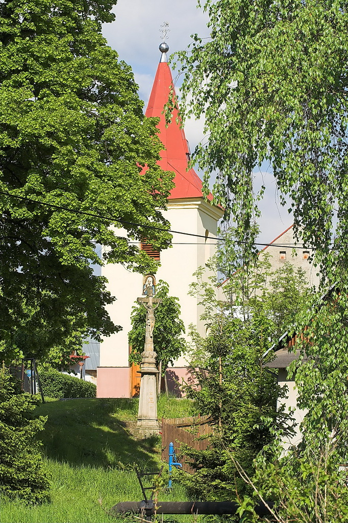 Česky: Zvonice v Jankovicích